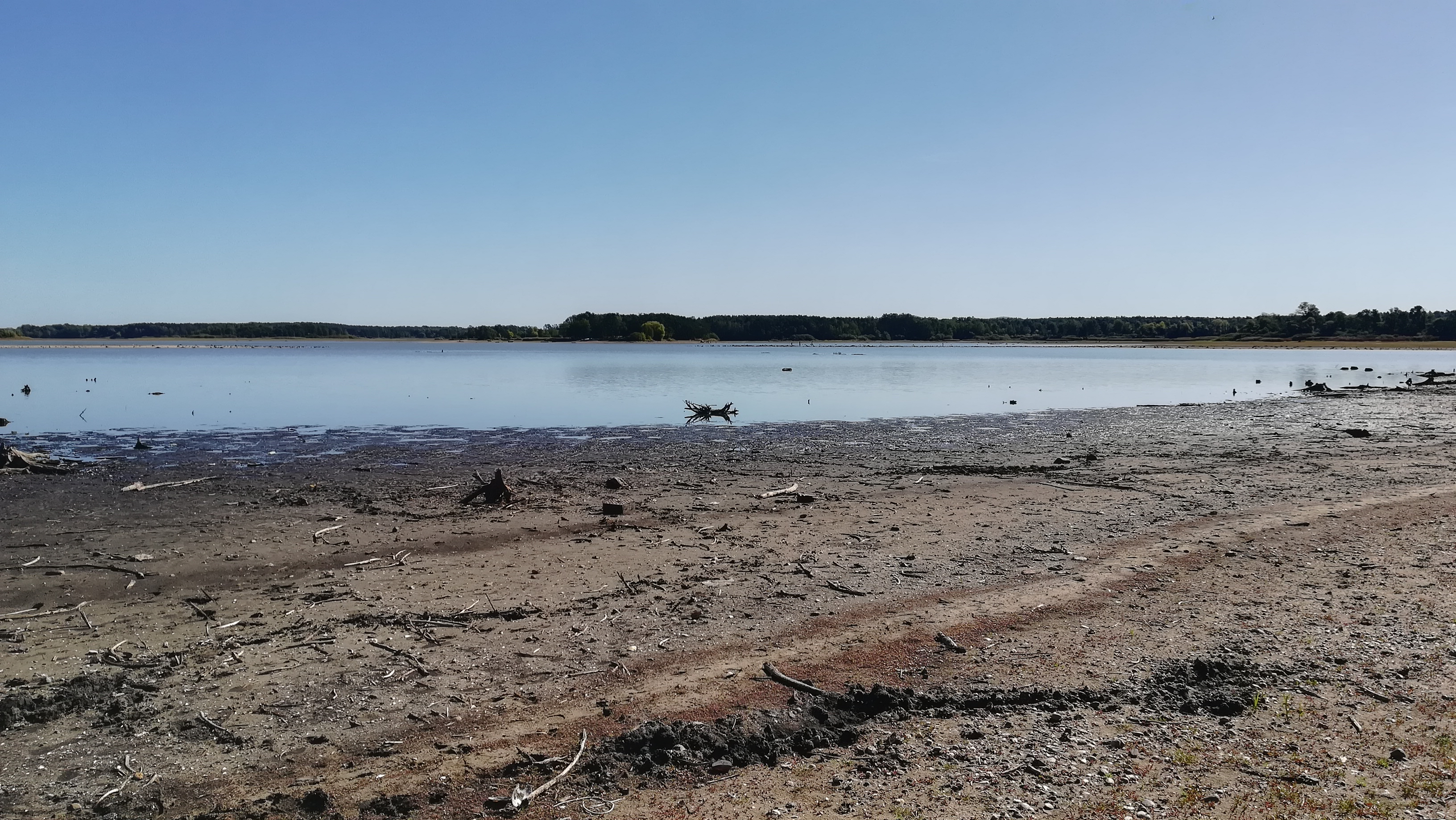 Stausee nach 3 Monaten Abstau (2019_09_21)